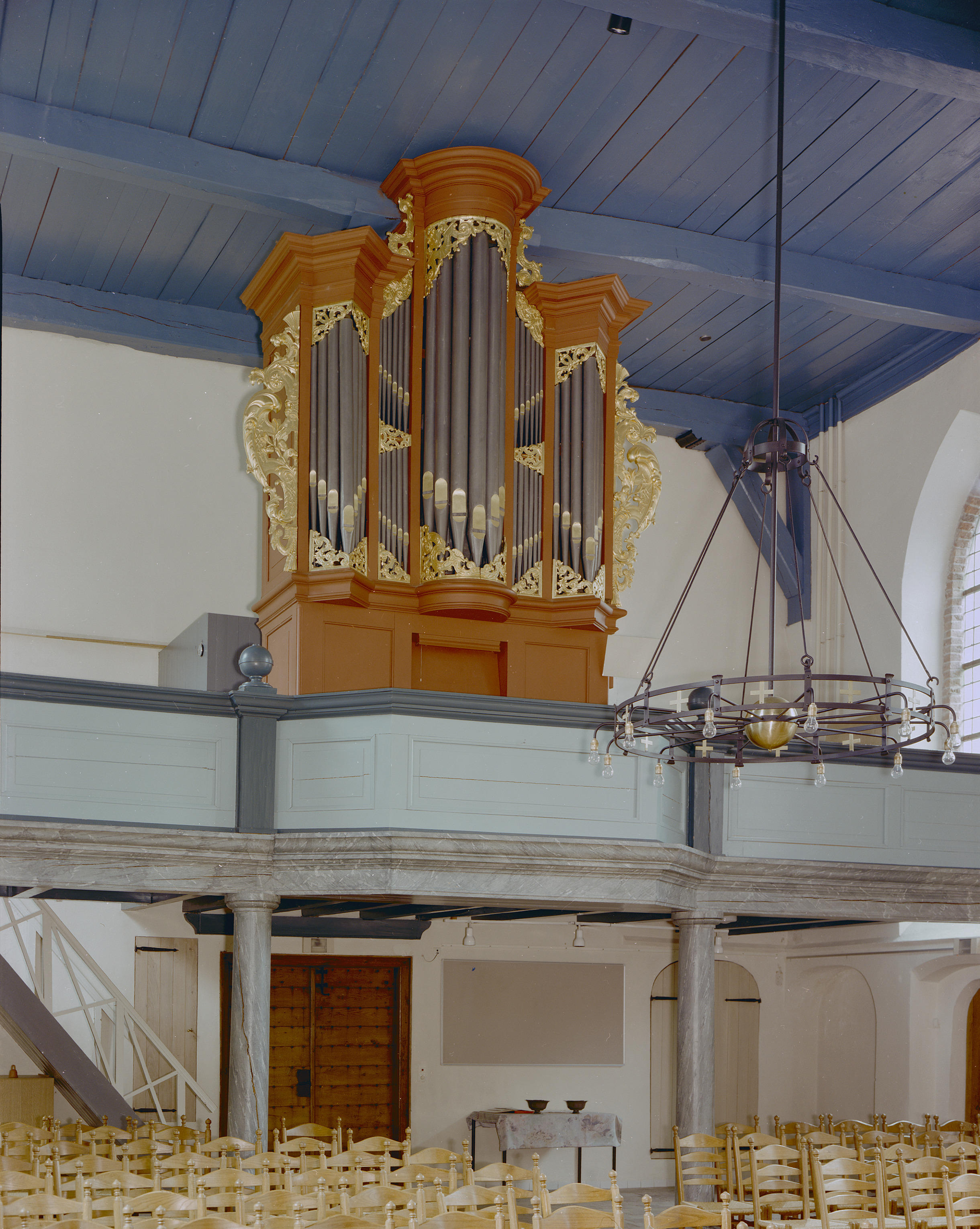 Nederlands Hervormde Kerk: Interieur, aanzicht orgel, orgelnummer 1640 (opmerking: Gefotografeerd voor Het Historische Orgel in Nederland 1726-1769, bladzijde 40)